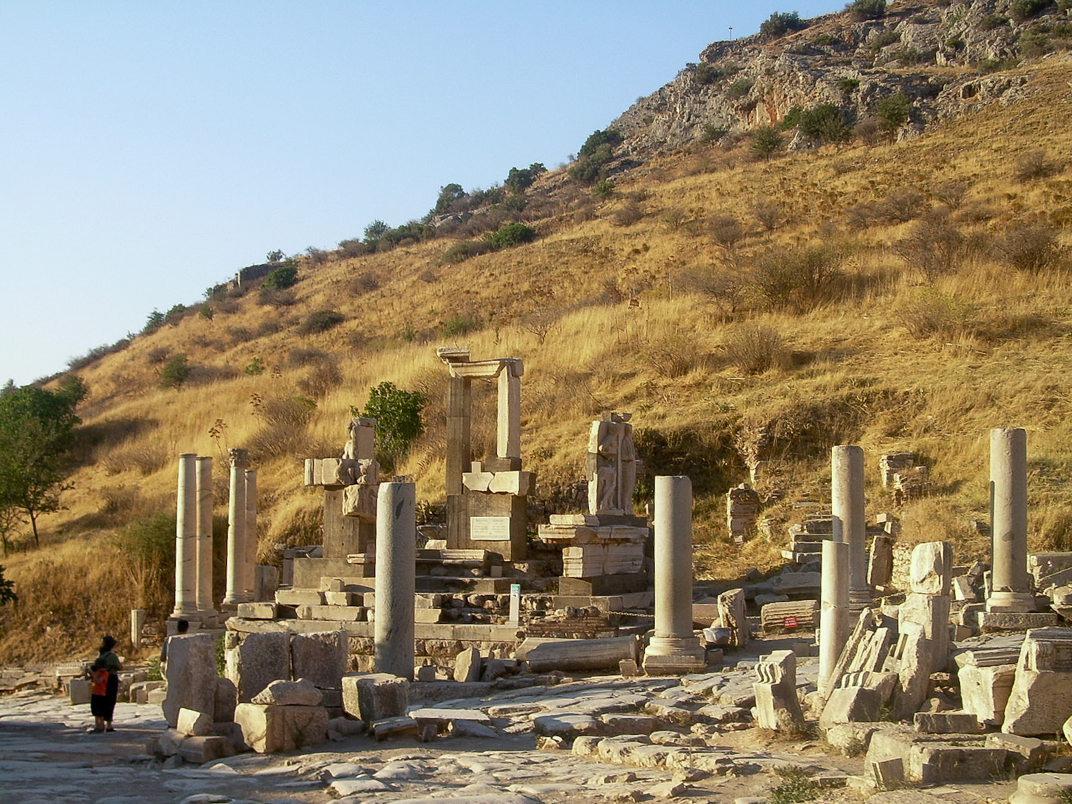 Prytaneion von Ephesos